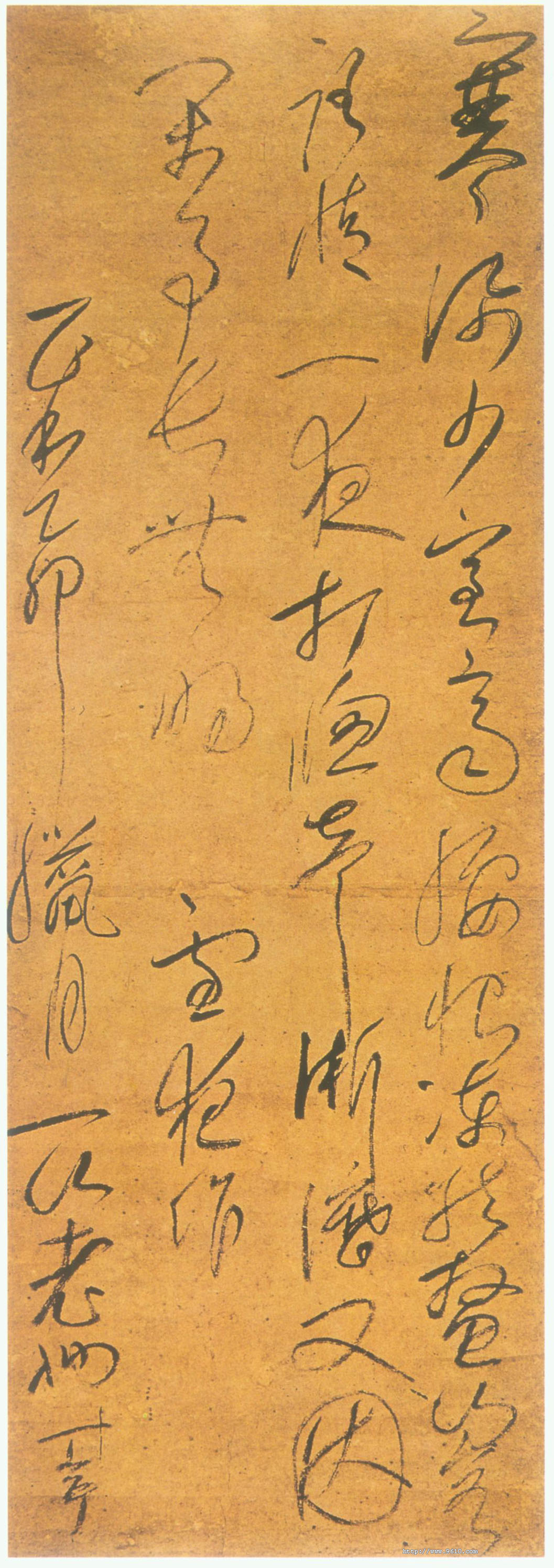 一山一宁书法